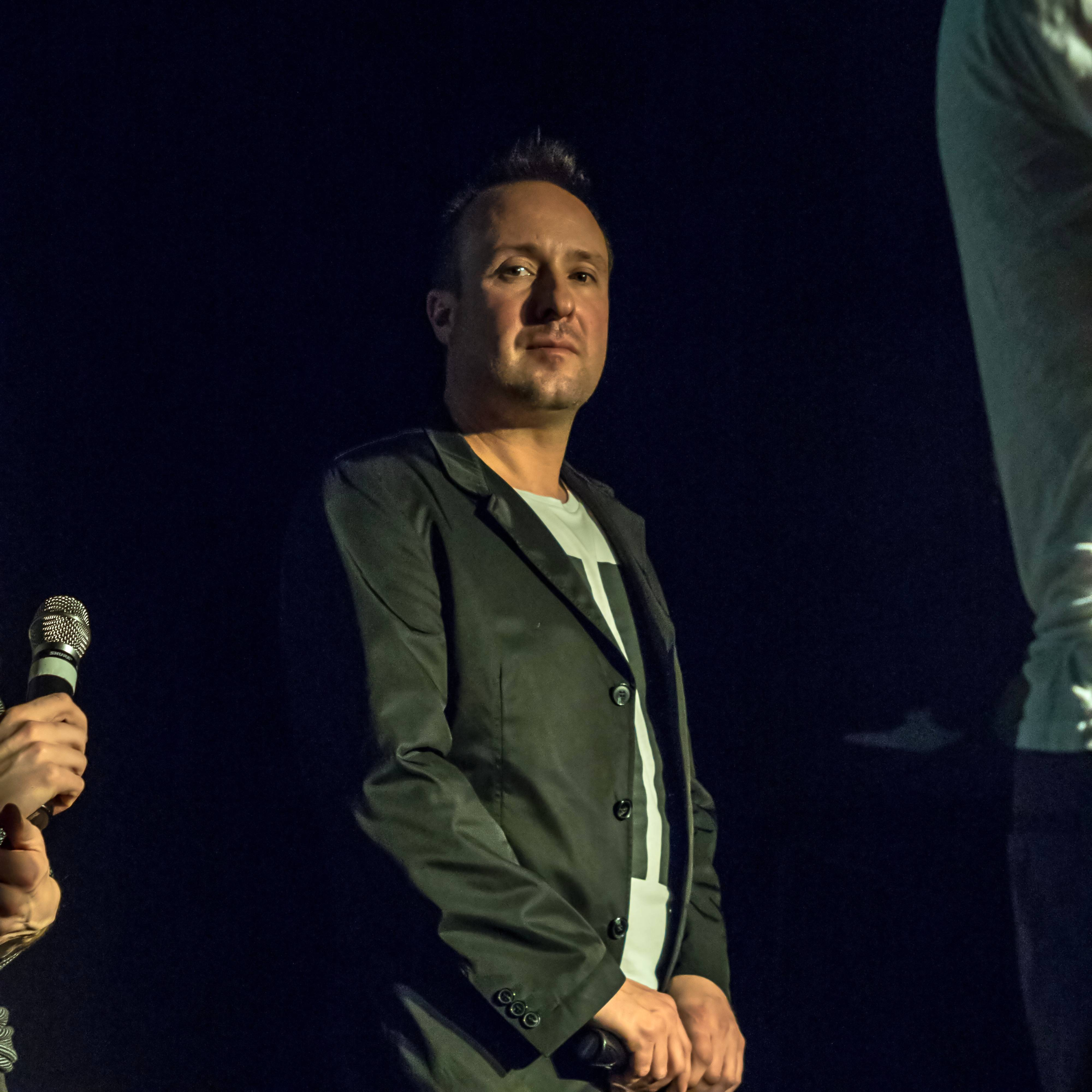 Bilder vom Konzert in Freiburg i. Br. Die A capella Gruppe Basta am 01. März 2015 Rene Overmann